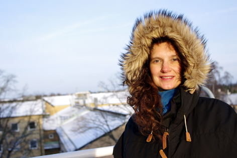 Lina Bertling Tjernberg, professor vid KTH